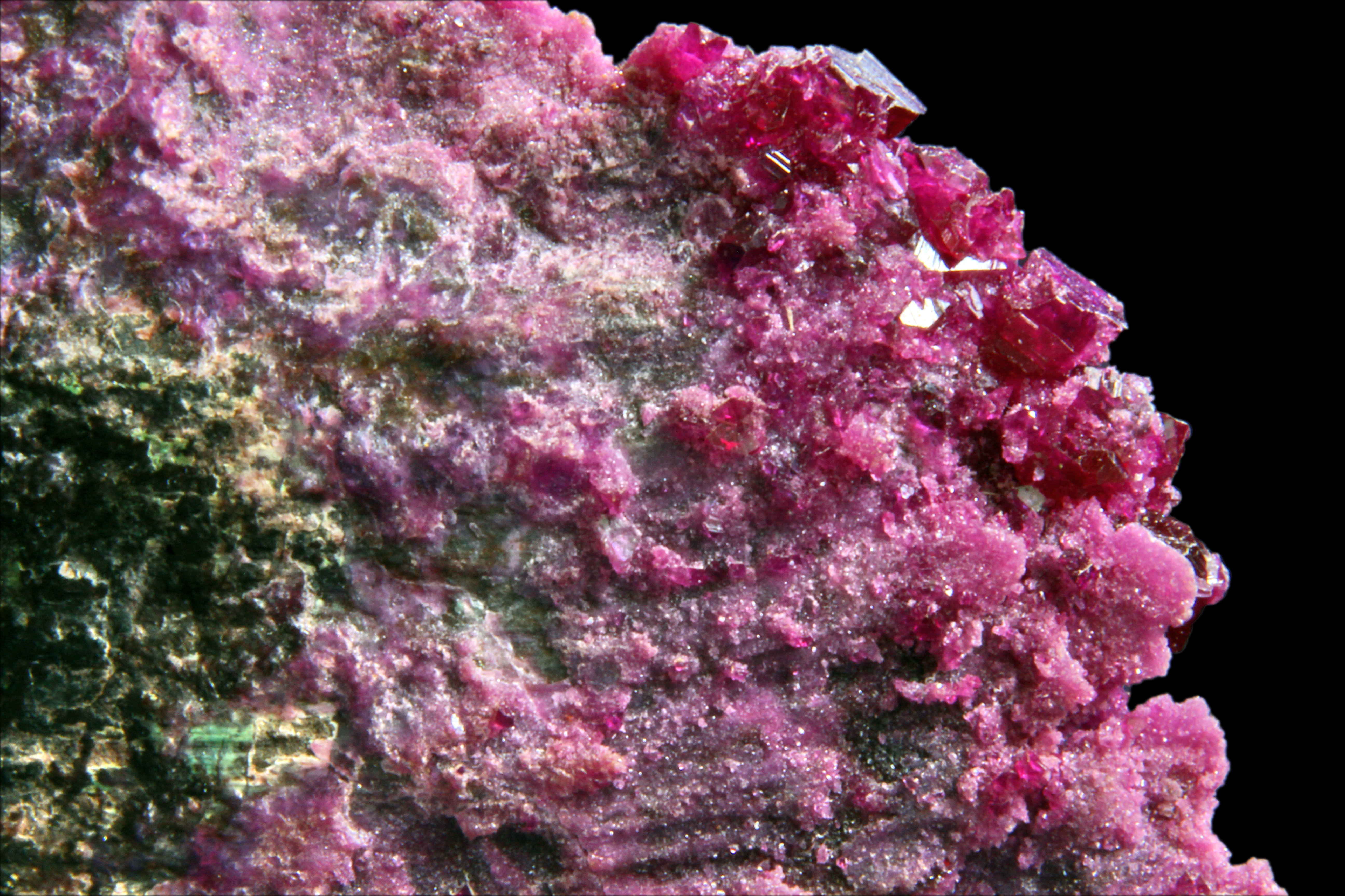 Kammereryt - Kopalnia Kop Krom, Guleman, Anatolia, Turcja.